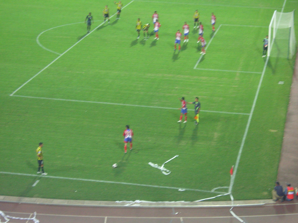 Partido Correspondiente a el Torneo Clausura del año 2008